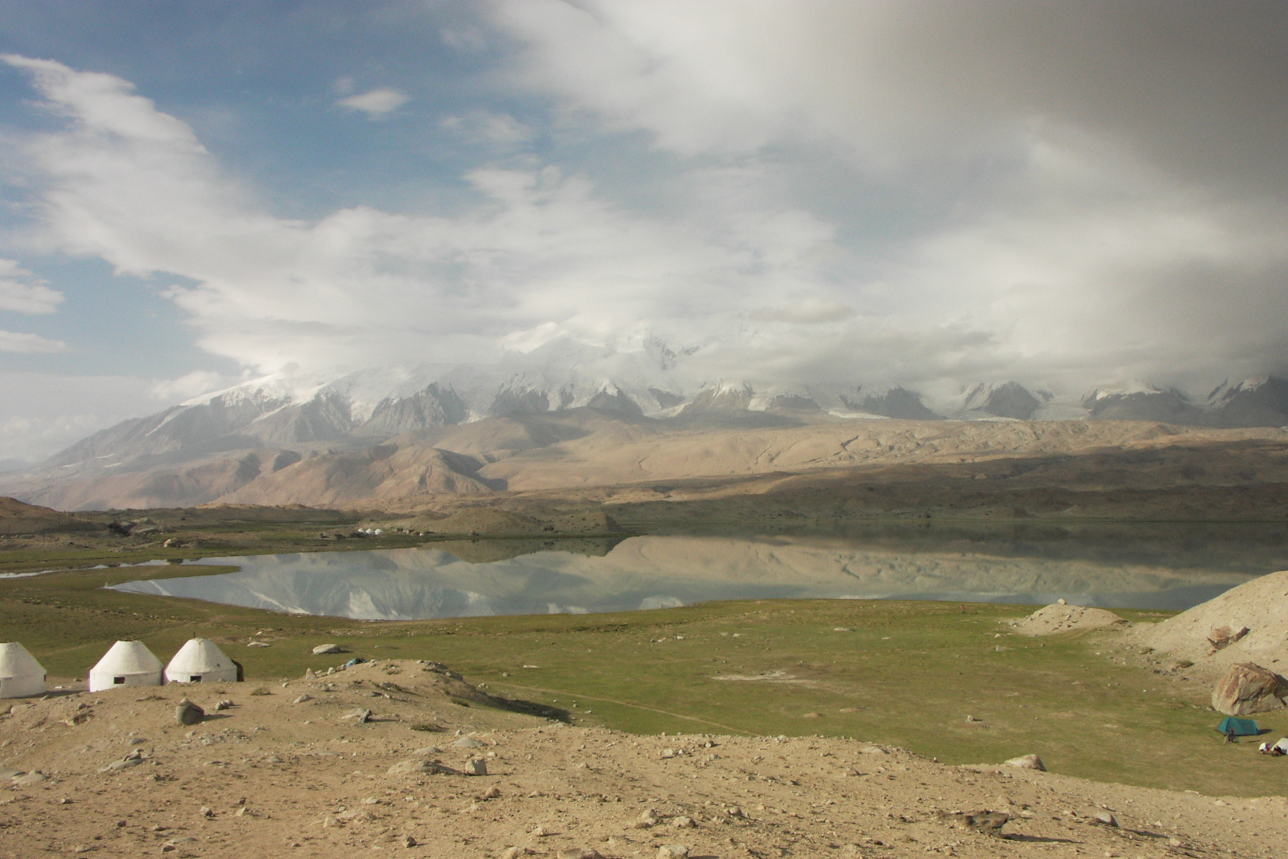 Arrivée au Lac Karakul - 3600m d'altitude, au milieu des pays ~stan